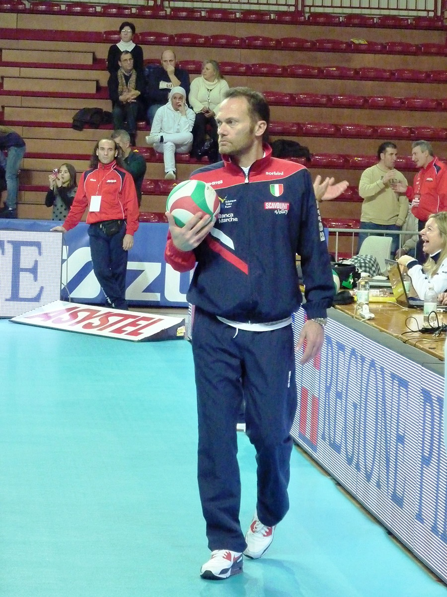 Paolo Tofoli, ex pallavolista italiano, oggi allenatore